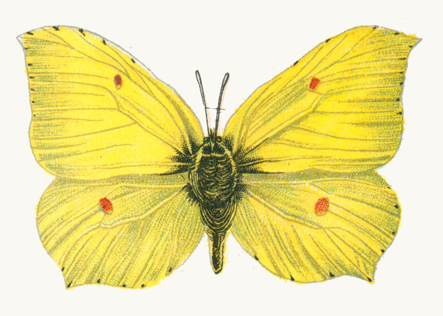 Gonepteryx rhamni male